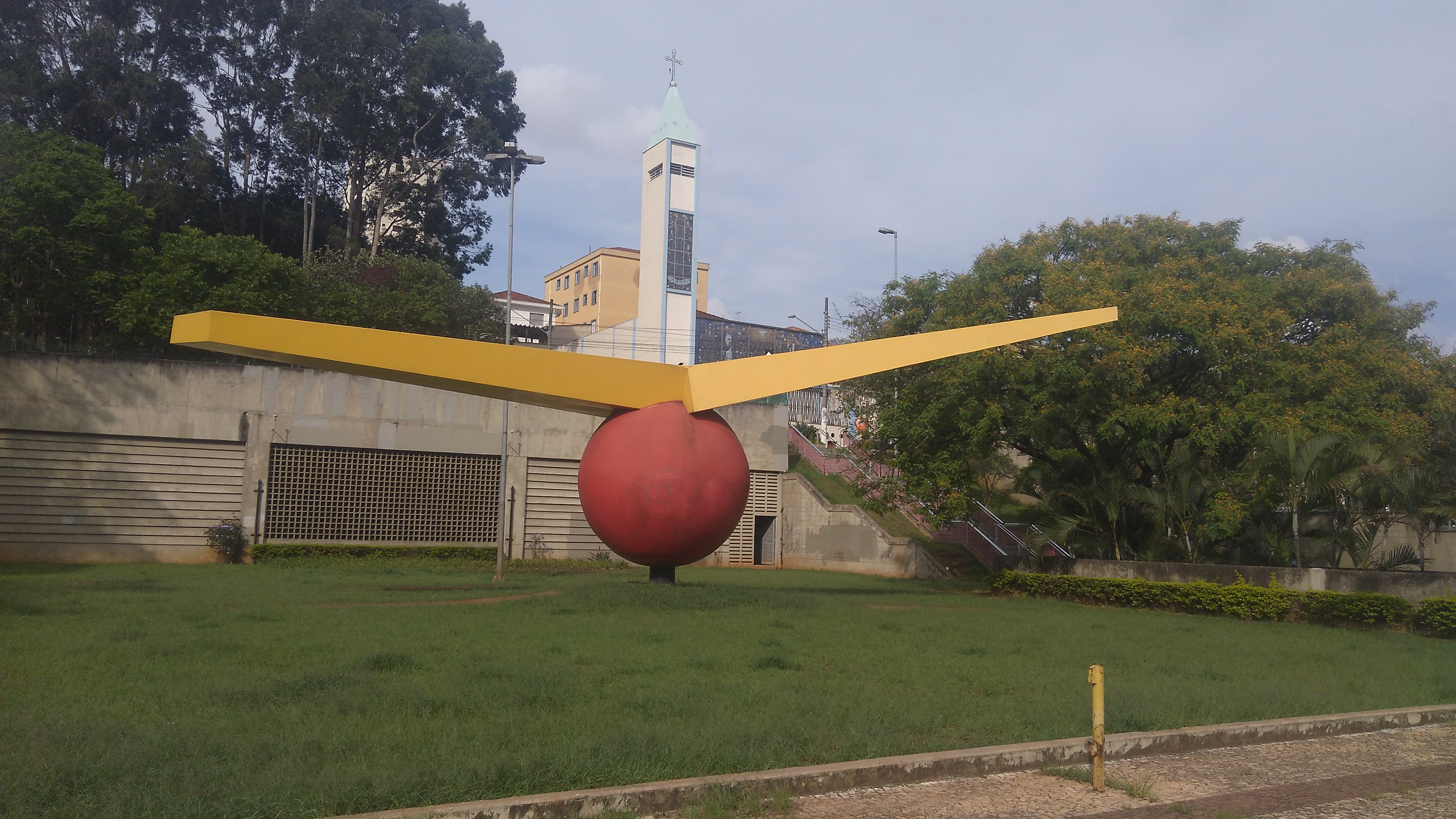 O Vôo de Xangô, feito por Gilberto Salvador em 1990, no bairro Jardim São Paulo, na cidade de São Paulo (SP). A obra é feita de aço e tinta epóxi, com a técnica de fundição e caldeiraria.